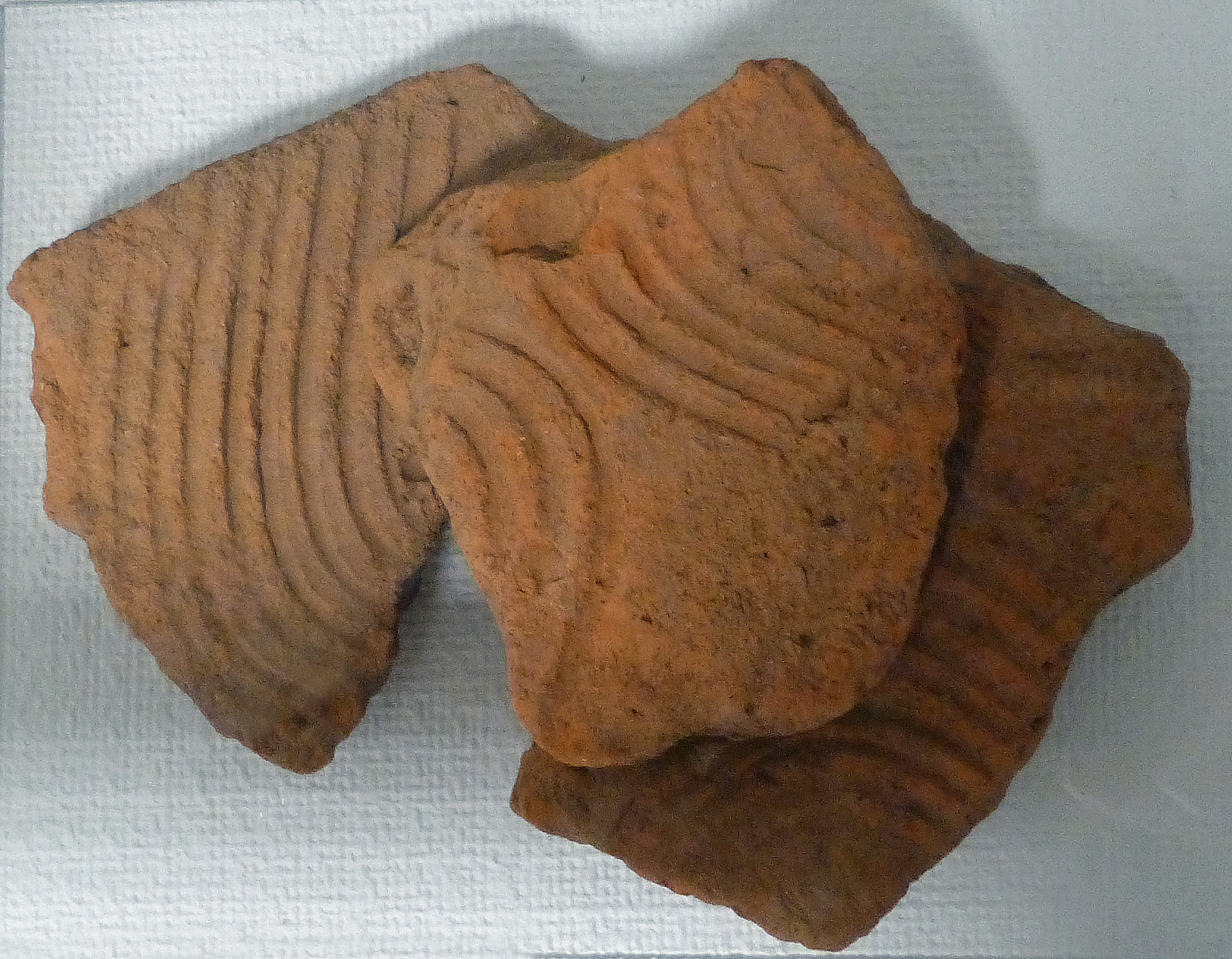 Brique peignée, terre cuite, IIIe-IVe s. ap. JC, découverte au mont Avison (Bruyères). Musée Pierre Noël de Saint-Dié-des-Vosges.